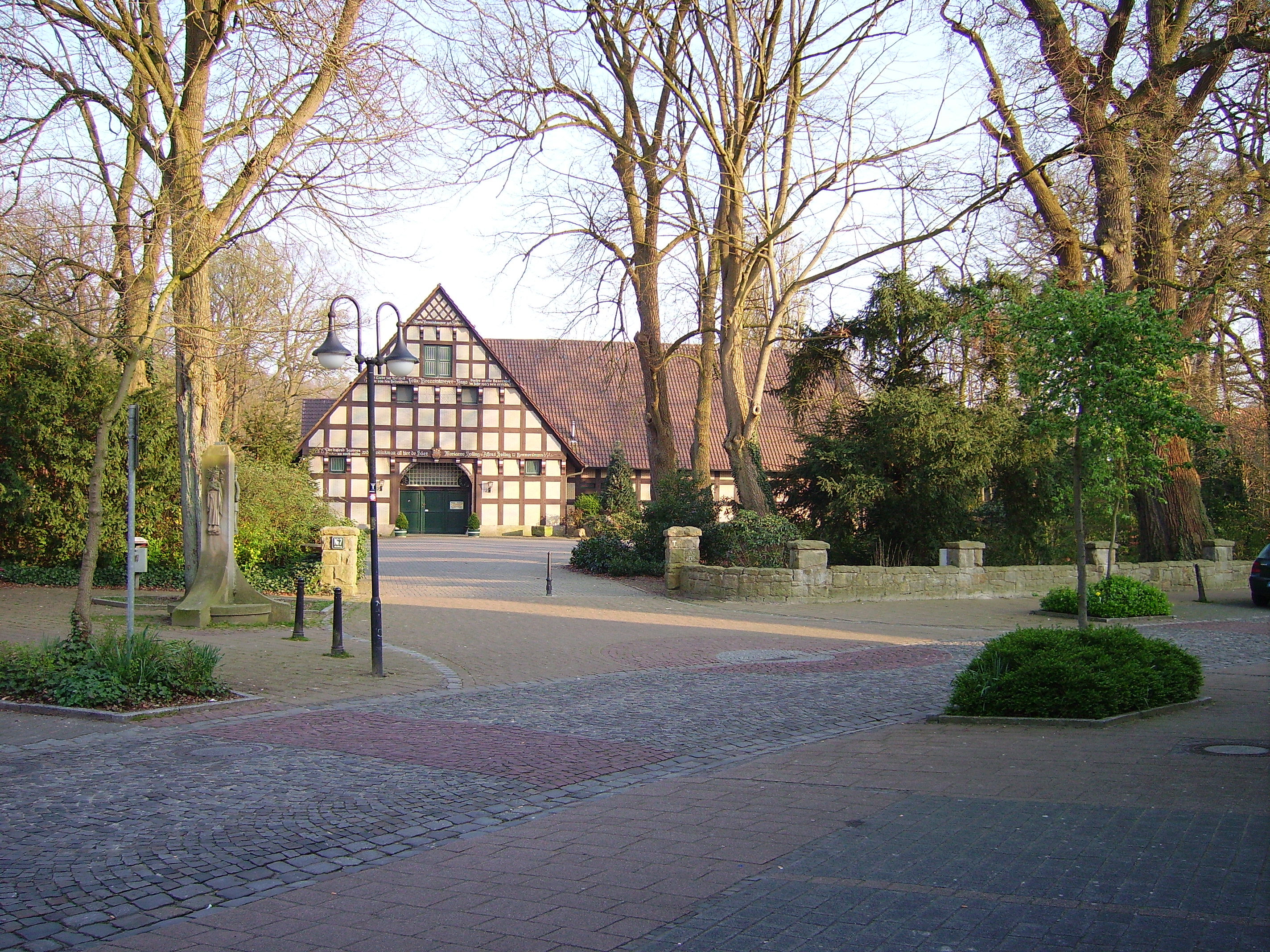 Hof Holling einer der ältesten Hofstellen in Hopsten. Lage direkt im Ortskern.